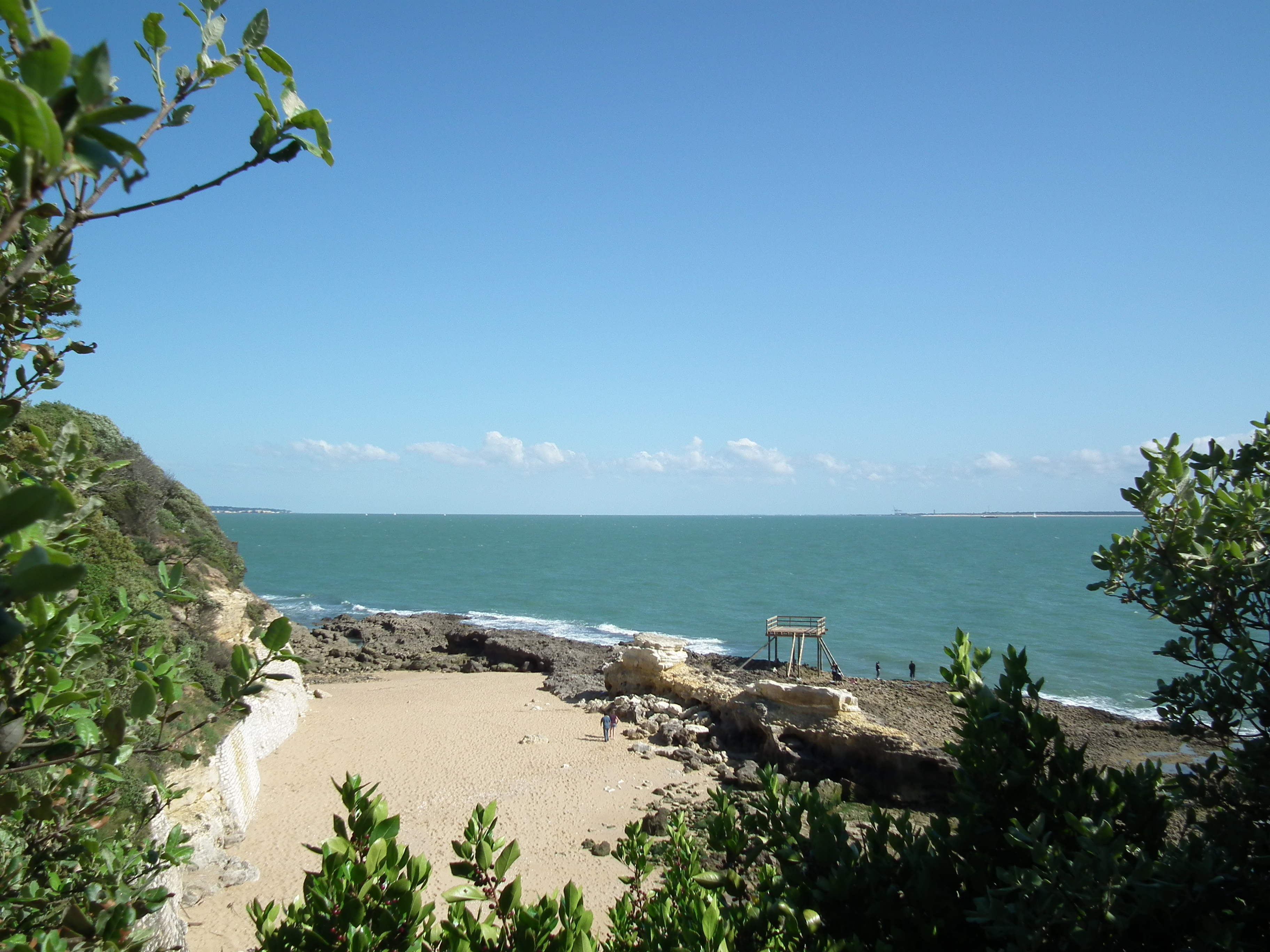 Le sentier des Douaniers à Saint-Palais-sur-Mer